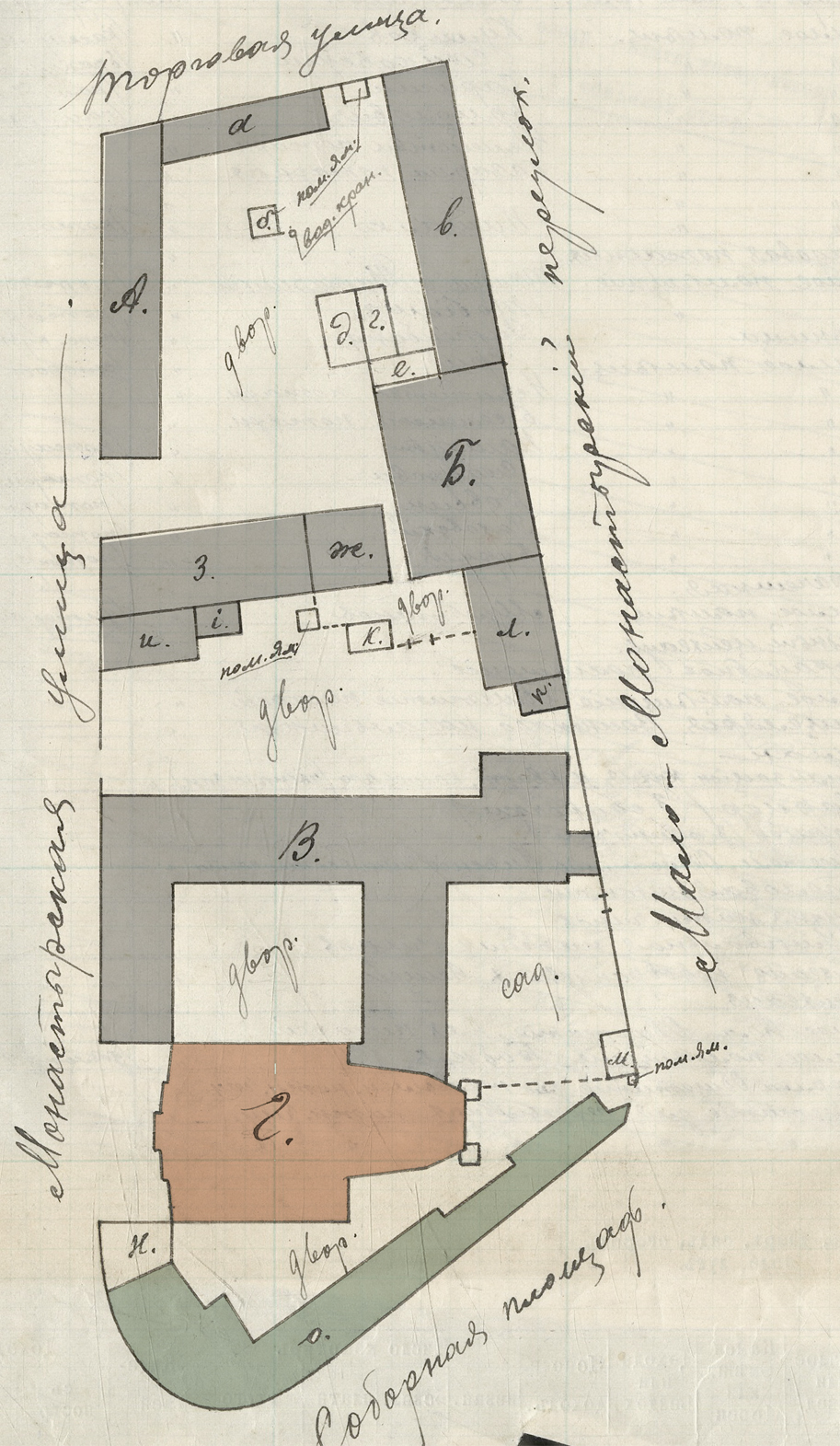 Беларуская (тарашкевіца): Менск (Miensk), вуліцы Малая Бэрнардынская (vulica Małaja Bernardynskaja) і Вялікая Бэрнардынская (vulica Vialikaja Bernardynskaja). Касьцёл Сьвятога Язэпа і кляштар бэрнардынаў